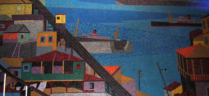 Detalle del mosaico Escena de Valparaíso, confeccionado en Italia de acuerdo a los bocetos del pintor chileno Camilo Mori, arribado a Chile en 1950 e instalado en la Escuela de Derecho de la Universidad de Valparaíso.